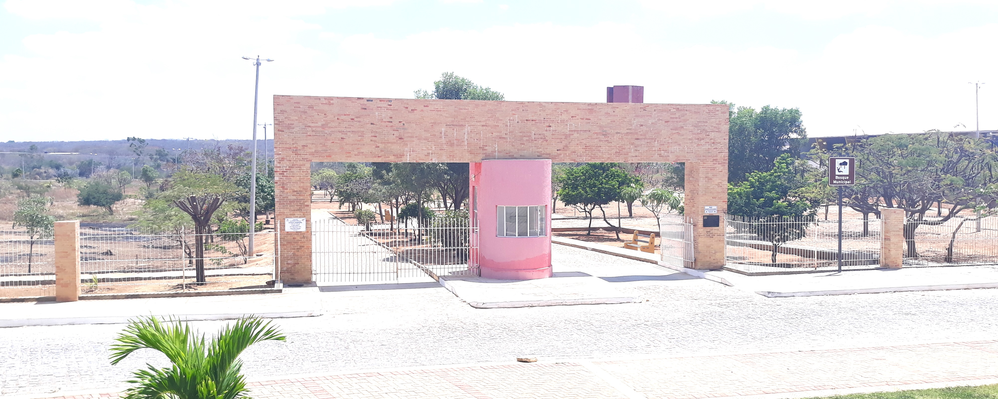 Bosque Municipal de Riacho da Cruz, Rio Grande do Norte (Brasil)